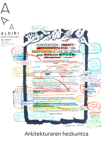 Aldiri aldizkariarren 28. alearen azala: Arkitektura eta Hezkuntza